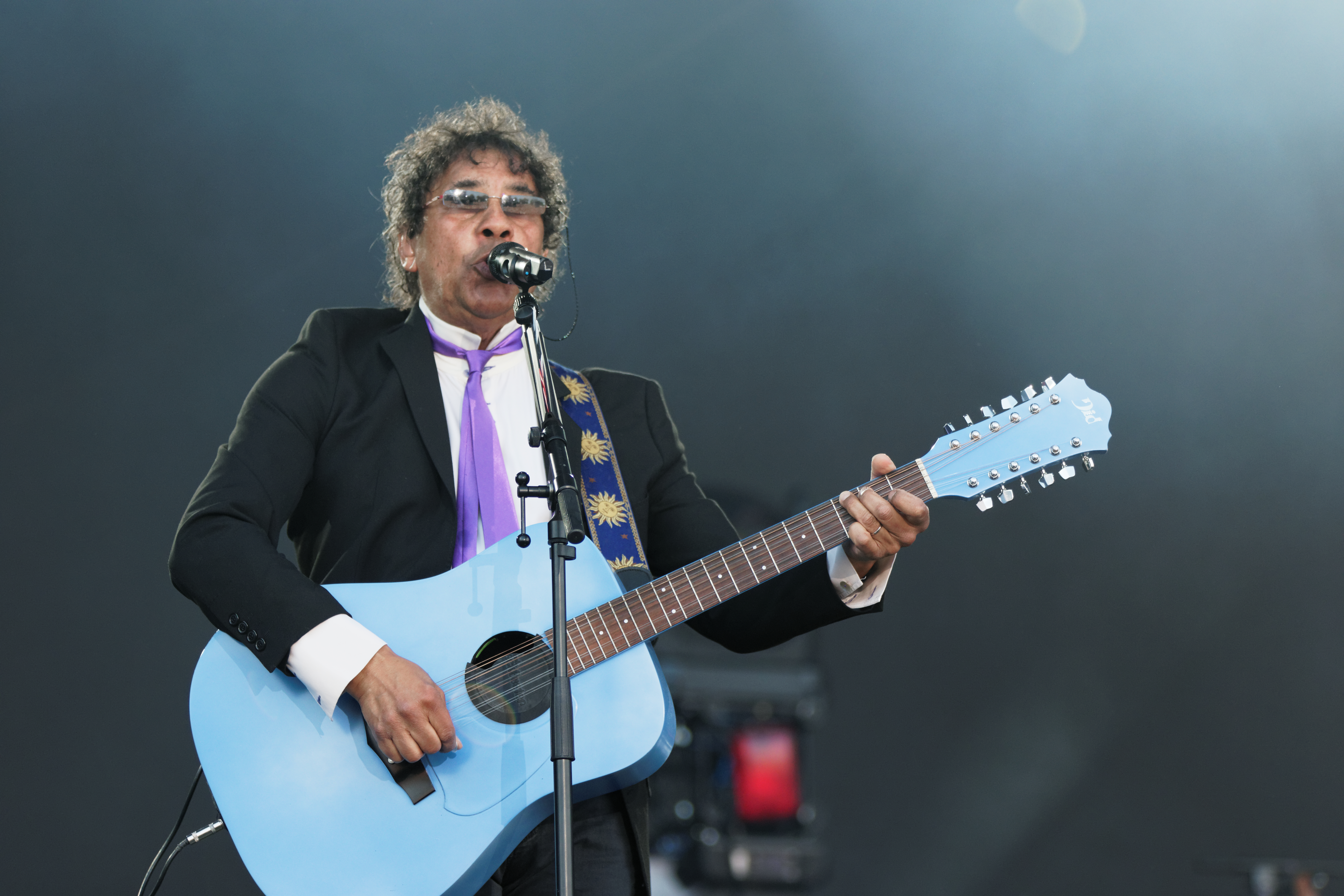 Alain Souchon et Laurent Voulzy en concert lors du festival des vieilles charrues 2016.